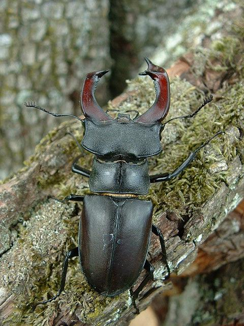 Lucanus cervus, Lucane cerf-volant, photo J.F. Gaffard, Vantoux-et-Longevelle, juin 2004